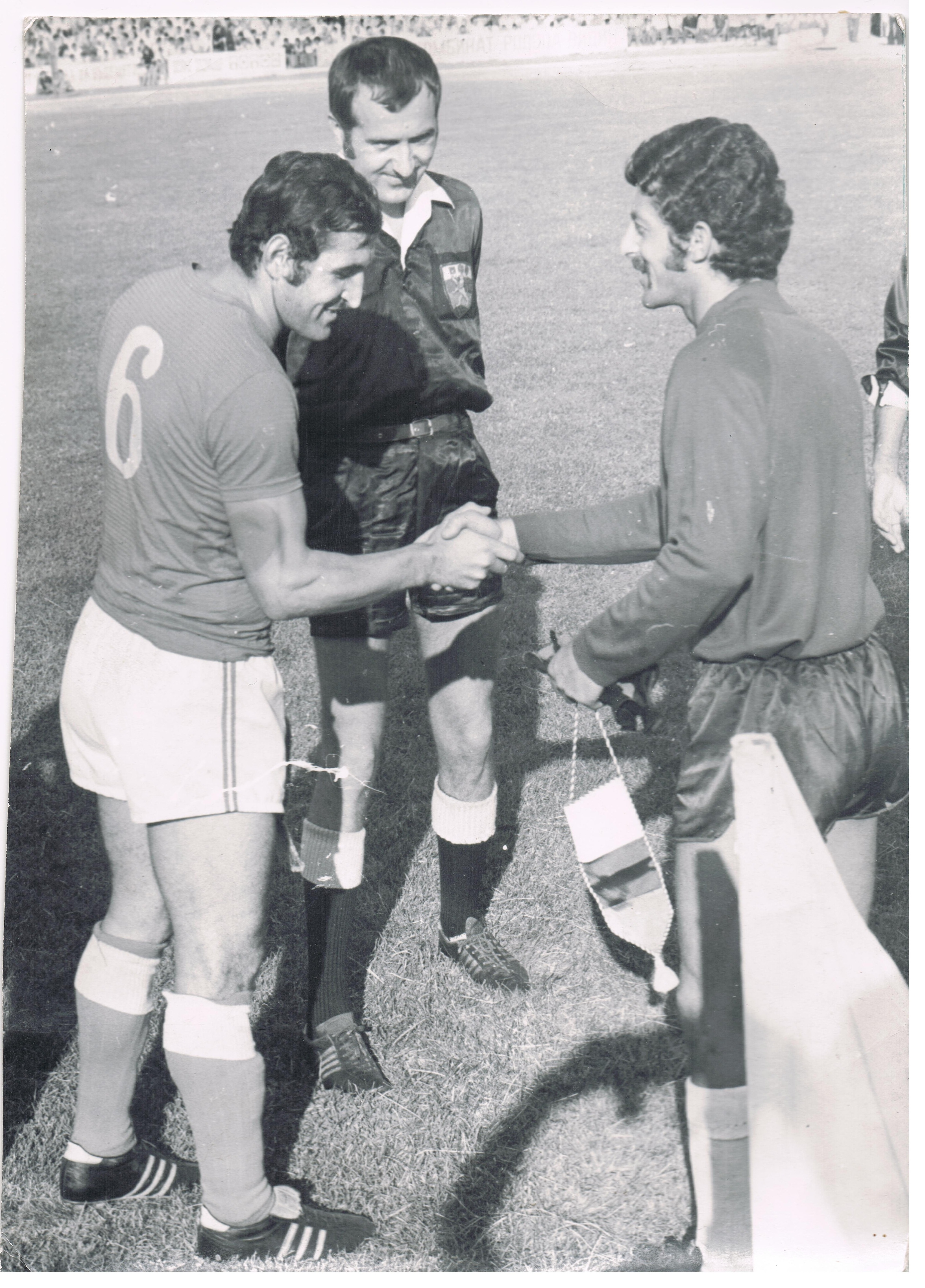 Димитър Пенев (вляво) и Никола Громков (вдясно)